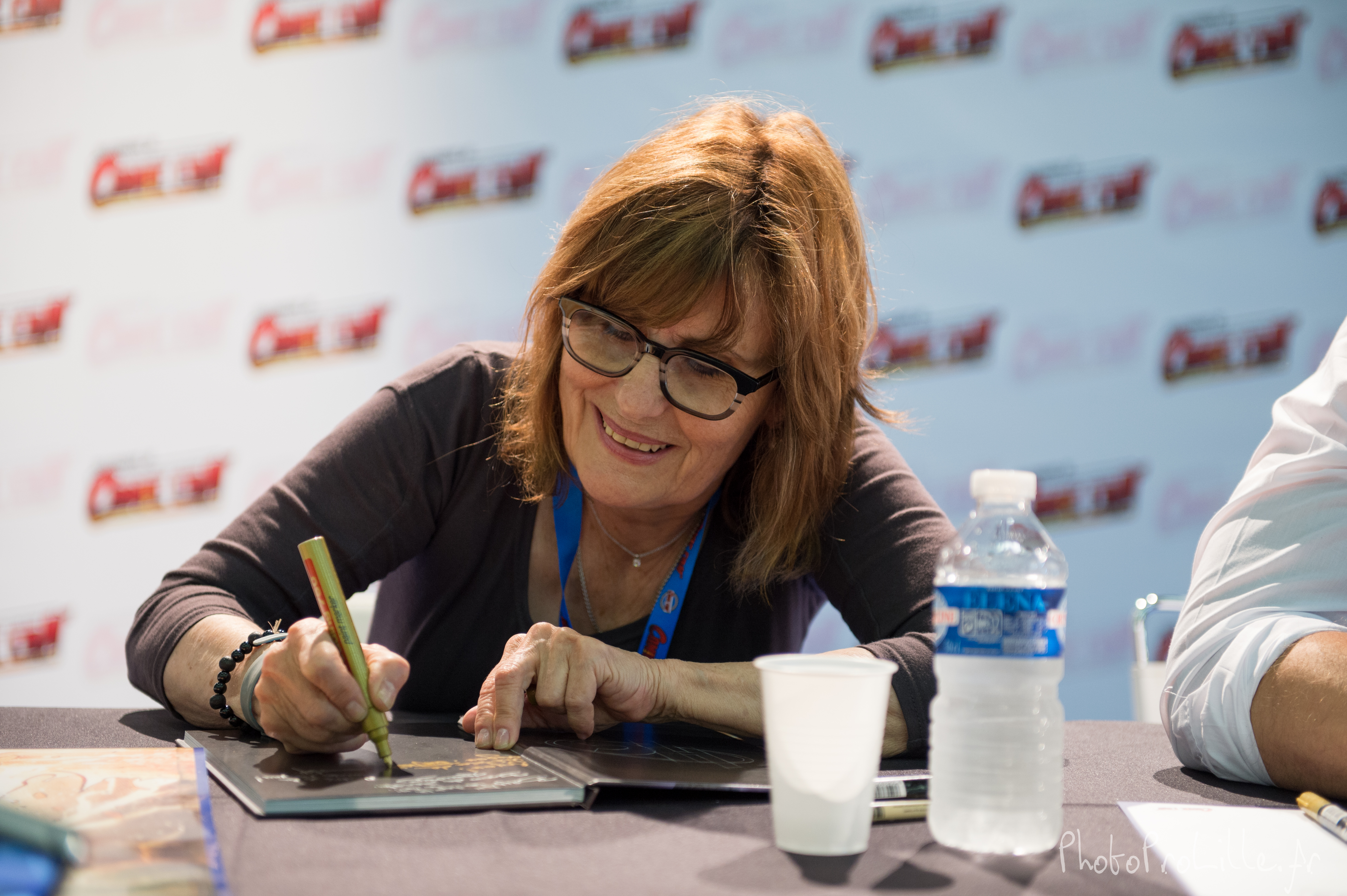 Josée Drevon au Comic Con #5 - Paris